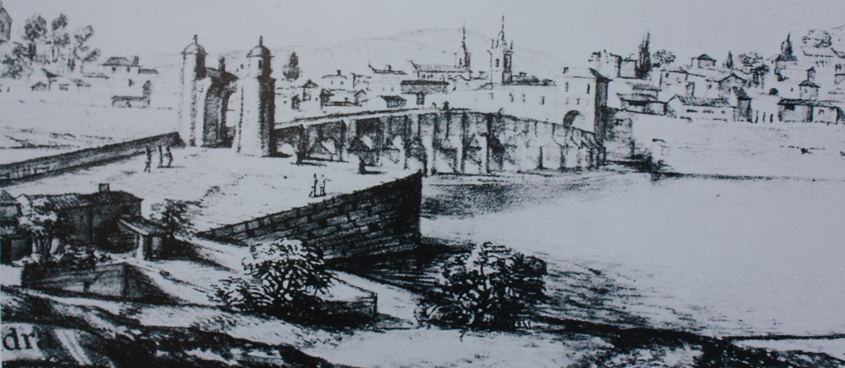 A Ponte do Burgo, en Pontevedra, nun debuxo realizado por Pier María Baldi en 1669.